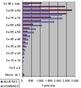 Gráfico de la mortalidad en la ciudad de Madrid en el año 2004. Fuente[1]